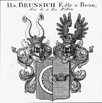 Wappen der Herren Brunsich, Edle von Brun, des heiligen römischen Reichs Ritter (Namensvariante: Brunsig, Edle von Brun)